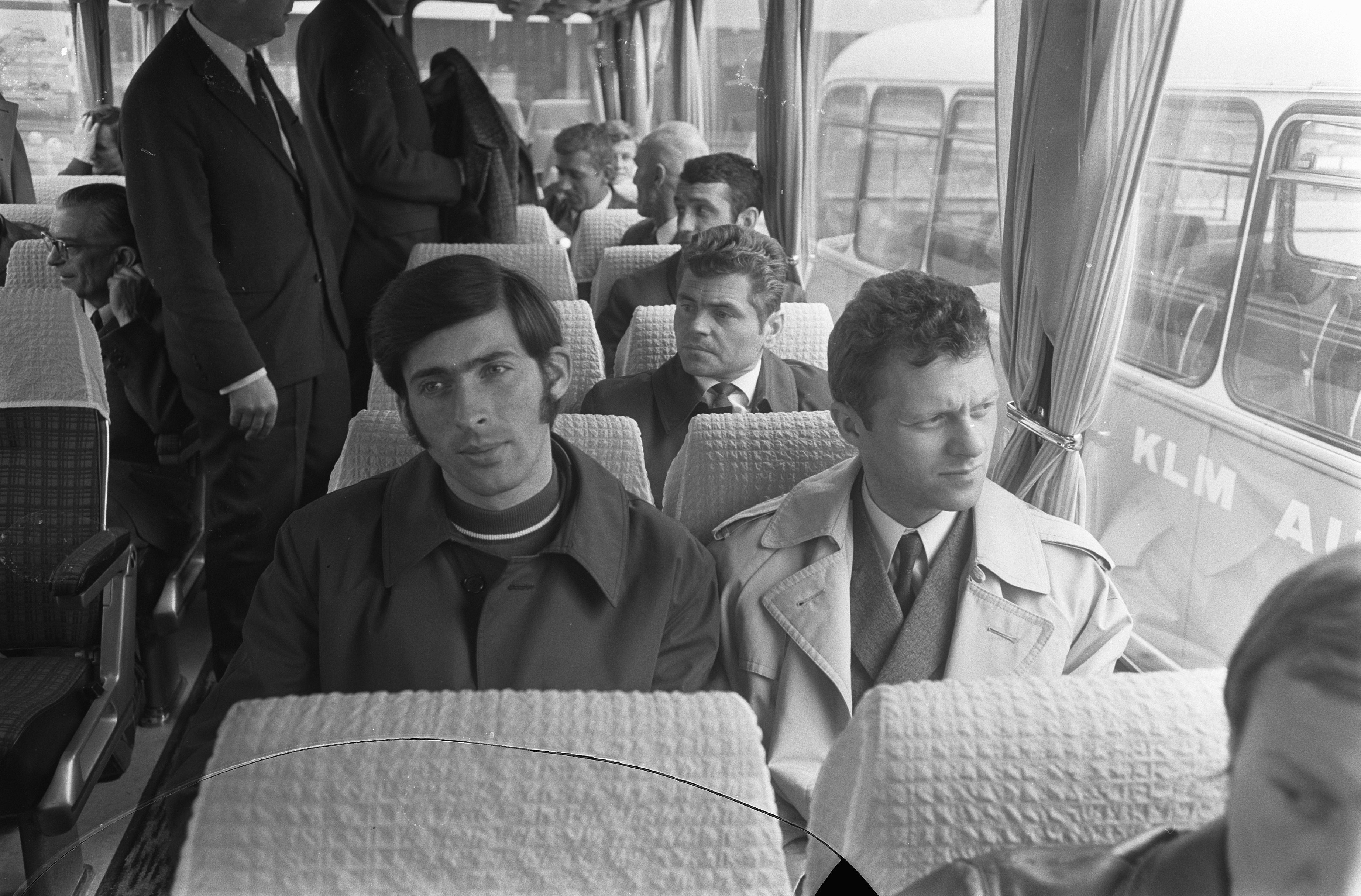 Collectie / Archief : Fotocollectie Anefo Reportage / Serie : [ onbekend ] Beschrijving : Het elftal van Legia-Warschau arriveert op Schiphol: in de bus (l.) Deyna, (m.) Brychzcy, (r.) Bernard Blaut Datum : 13 april 1970 Locatie : Noord-Holland, Schiphol Trefwoorden : sport, voetbal Persoonsnaam : Blaut, Bernard, Brychzcy, Peter, Deyna, Kazimierz Fotograaf : Koch, Eric / Anefo Auteursrechthebbende : Nationaal Archief Materiaalsoort : Negatief (zwart/wit) Nummer archiefinventaris : bekijk toegang 2.24.01.05 Bestanddeelnummer : 923-4327